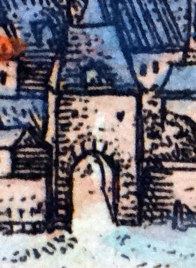 Gänspforte, Worms. Detail aus: Georg Braun, Simon Novellanus und Franz Hogenberg: Beschreibung und Contrafactur der vornembster Stät der Welt. Heinrich von Ach, Köln 1574. Tafel zwischen den Seiten 35 und 36. Stadtarchiv Worms: Abt. 214 Nr. 1499.